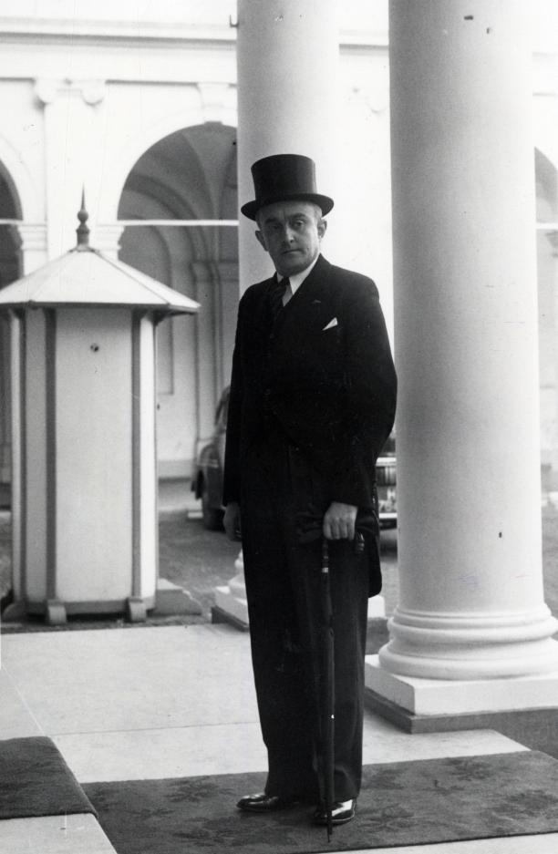 Jacob, H.L. s' (Partijloos). Mr. H.L. s' Jacob op Paleis Noordeinde, bij zijn beëdiging als Minister van Oorlog en Marine. Nederland, Den Haag, 16 oktober 1950.